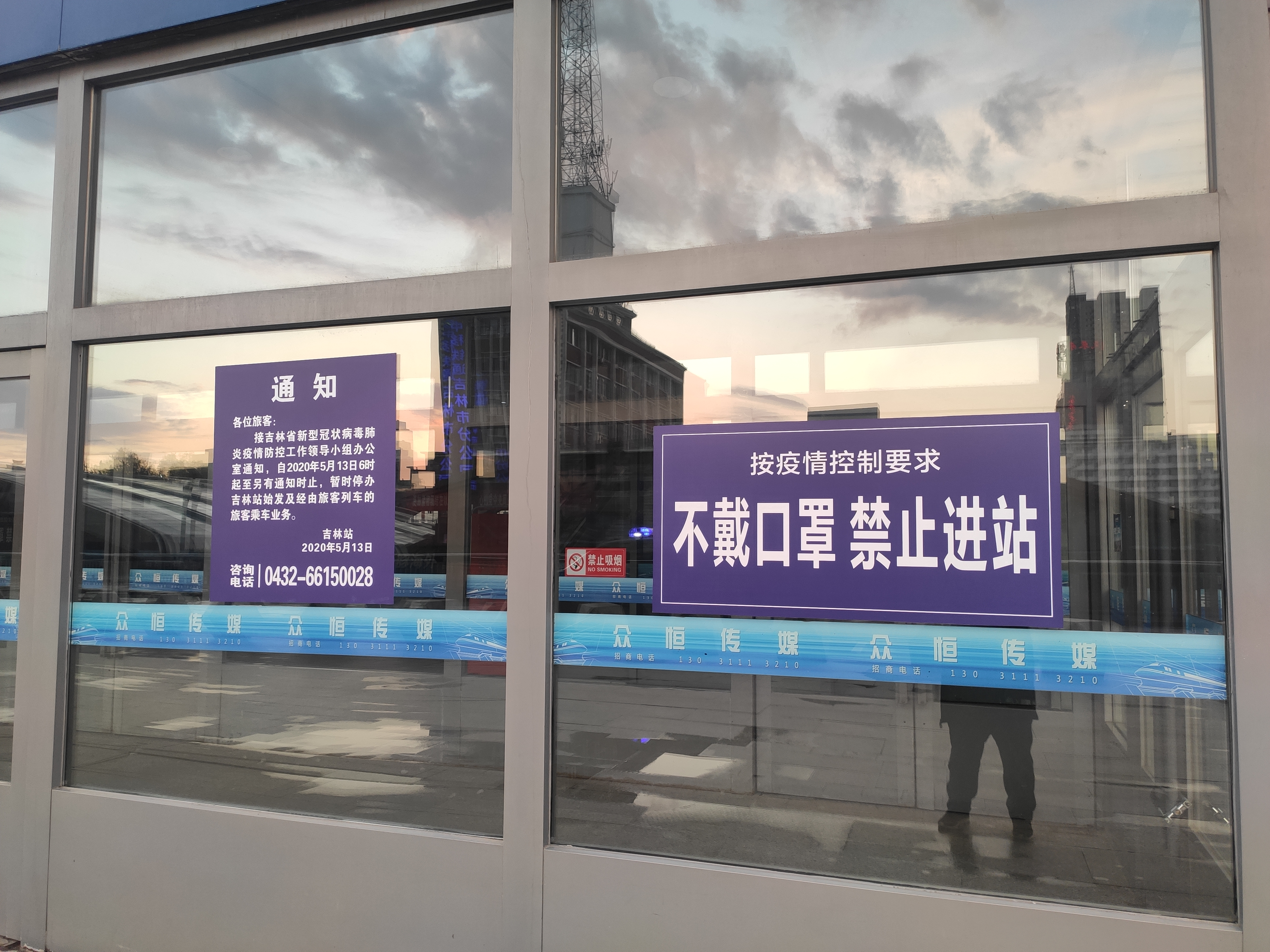 吉林站西进站口的告示。